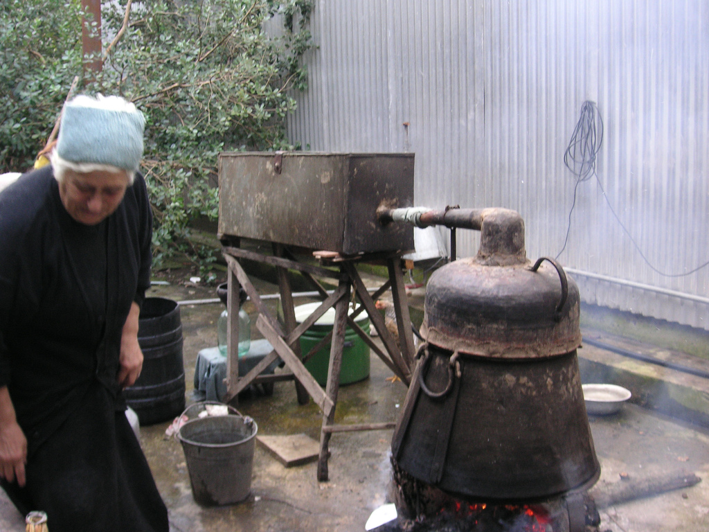 Making Chacha